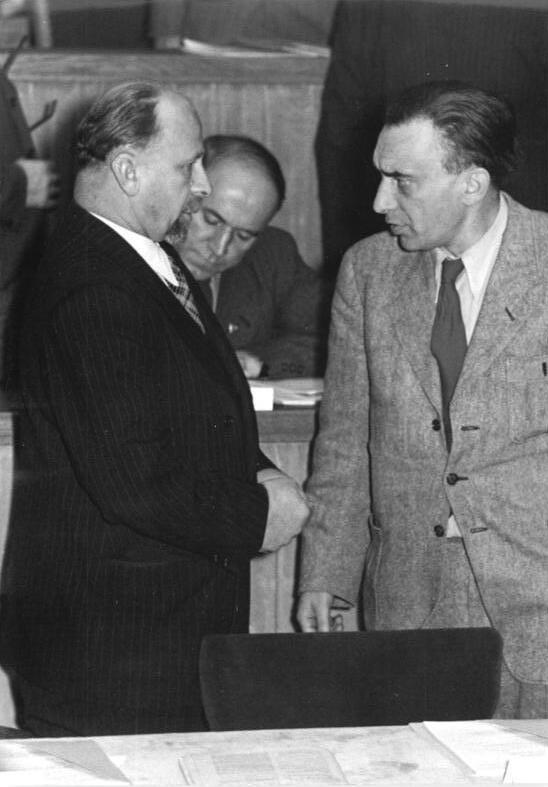 Illus/Sturm 31.10.51 13. und 14. Sitzung der Volkskammer Die Volkskammer der DDR trat am 31.10.51 und 1.11.51 zu ihrer 13. und 14. Sitzung zusammen, um u.a. über das "Gesetz über den Fünfjahresplan zur Entwicklung der Volkswirtschaft der Deutschen Demokratischen Republik", den Rechenschaftsbericht der Regierung über die Einnahmen der Republik und ihre Verwendung für das Rechnungsjahr 1951 und das "Gesetz über die Deutsche Notenbank" zu beraten. UBz: Stellv. Ministerpräsident Ulbricht und das Mitglied des Politbüros der SED Rudolf Herrnstadt im Gespräch.